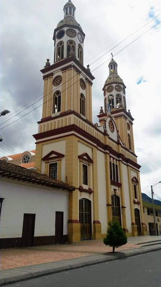 Esta fotografía fue tomada en el municipio colombiano con código 25745.